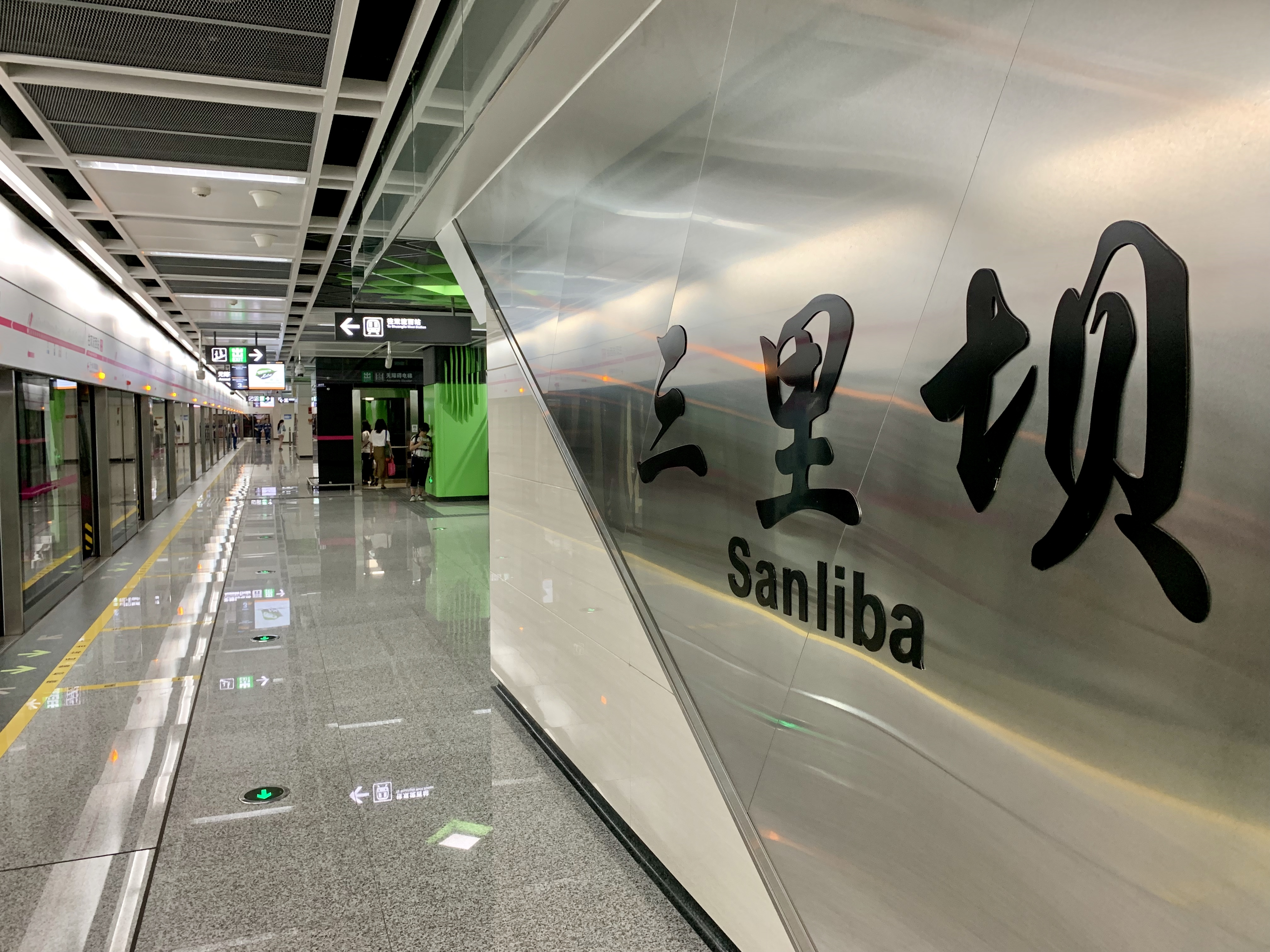 成都地铁三里坝站